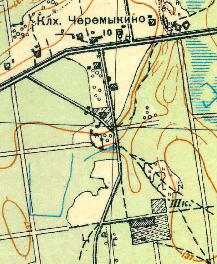 Топографическая карта Ленинградской области, квадрат О-35-24-А-б (Витино), деревня Черемыкино